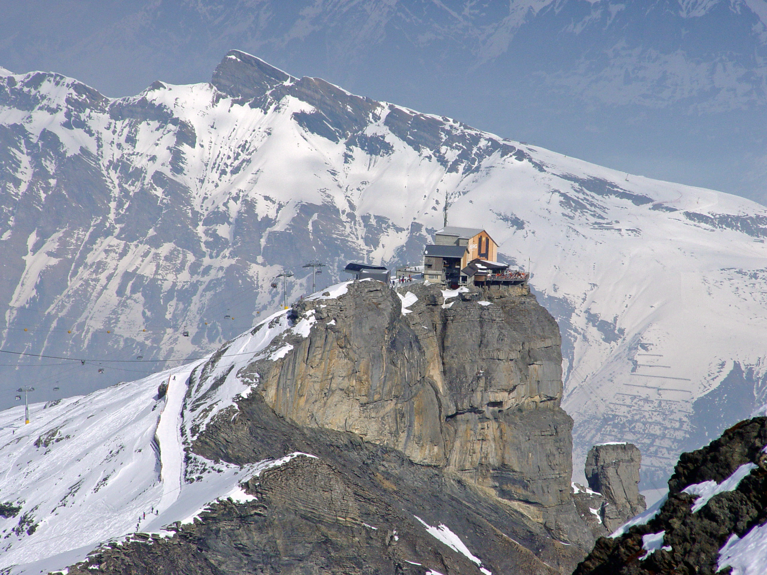 Foto von Birgstation im Frühling 2007